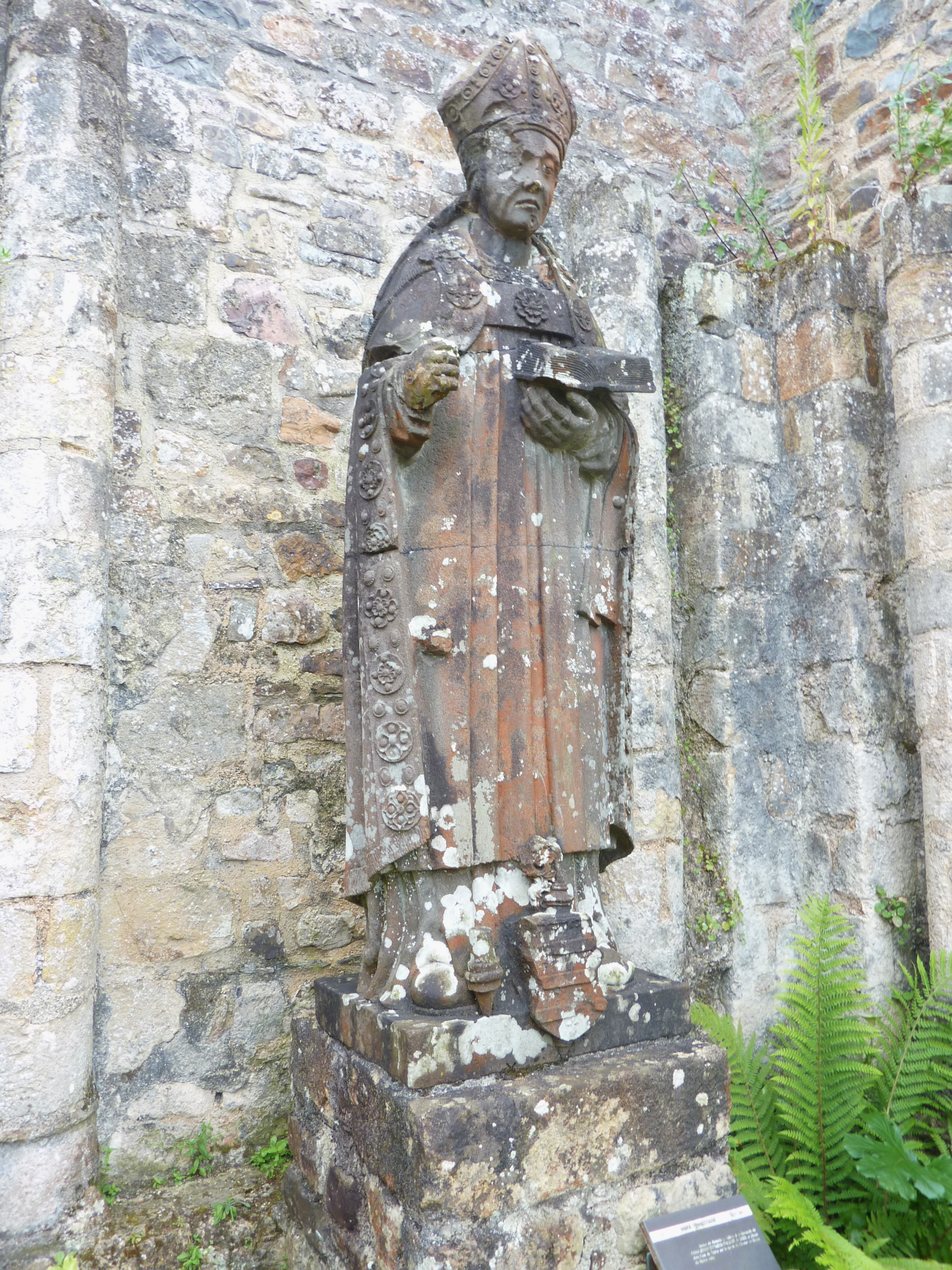 Abbaye de Landévennec : statue de saint Guénolé en kersanton réalisée en 1522 à la demande de l'abbé Jehan du Vieux-Chastel et alors placée dans l'axe de l'église sur la carole du choeur au-dessus du maître-autel (statue se trouvant désormais dans les ruines de l'église abbatiale)